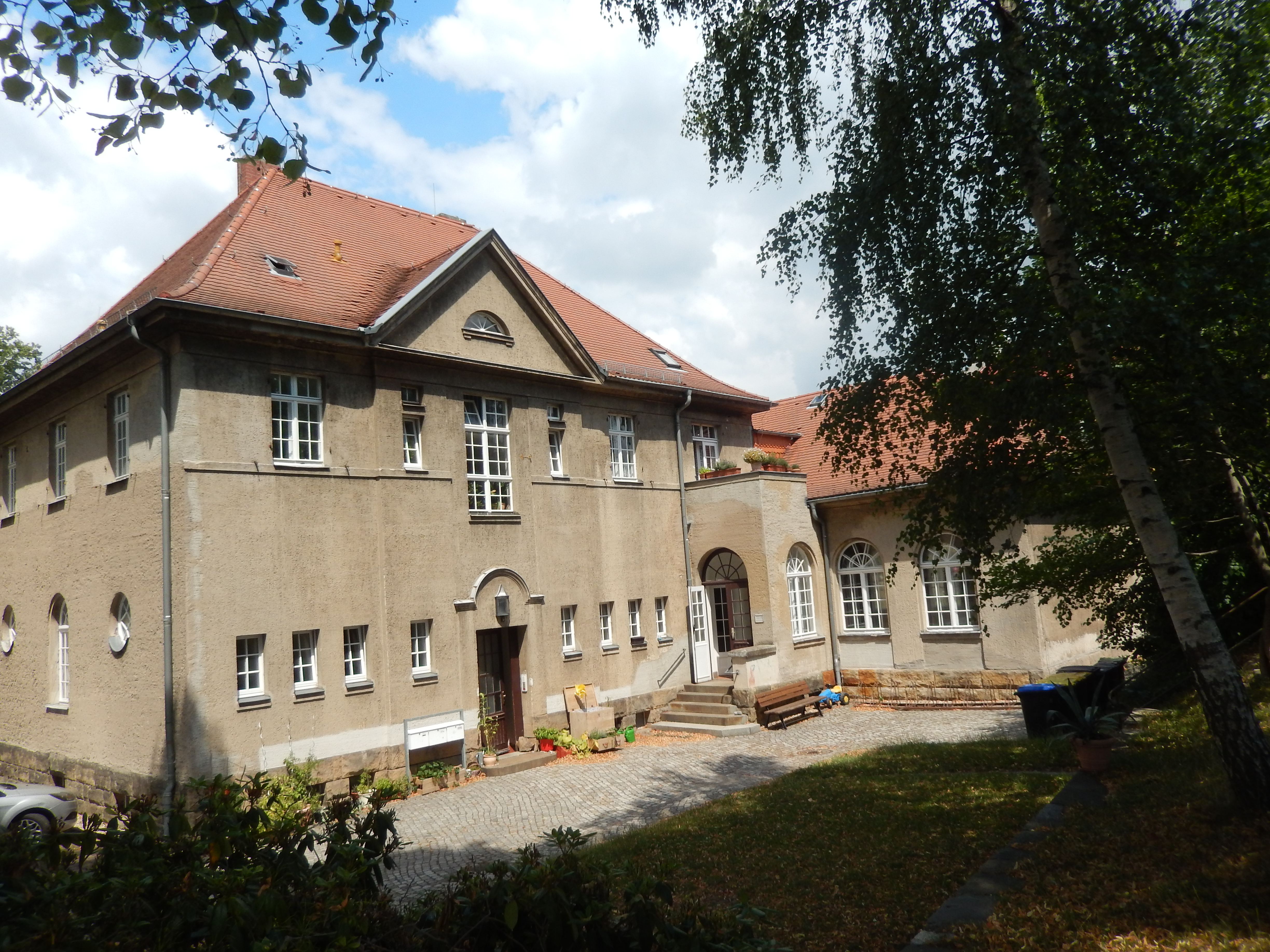 Stadtkirche "Zum Heiligen Namen Gottes" Radeberg, Klanghaus